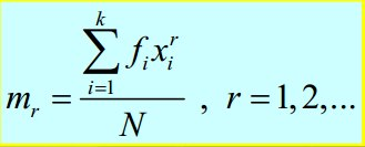 Формула за Мр групирани податоци